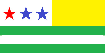 Bandera de Tosagua